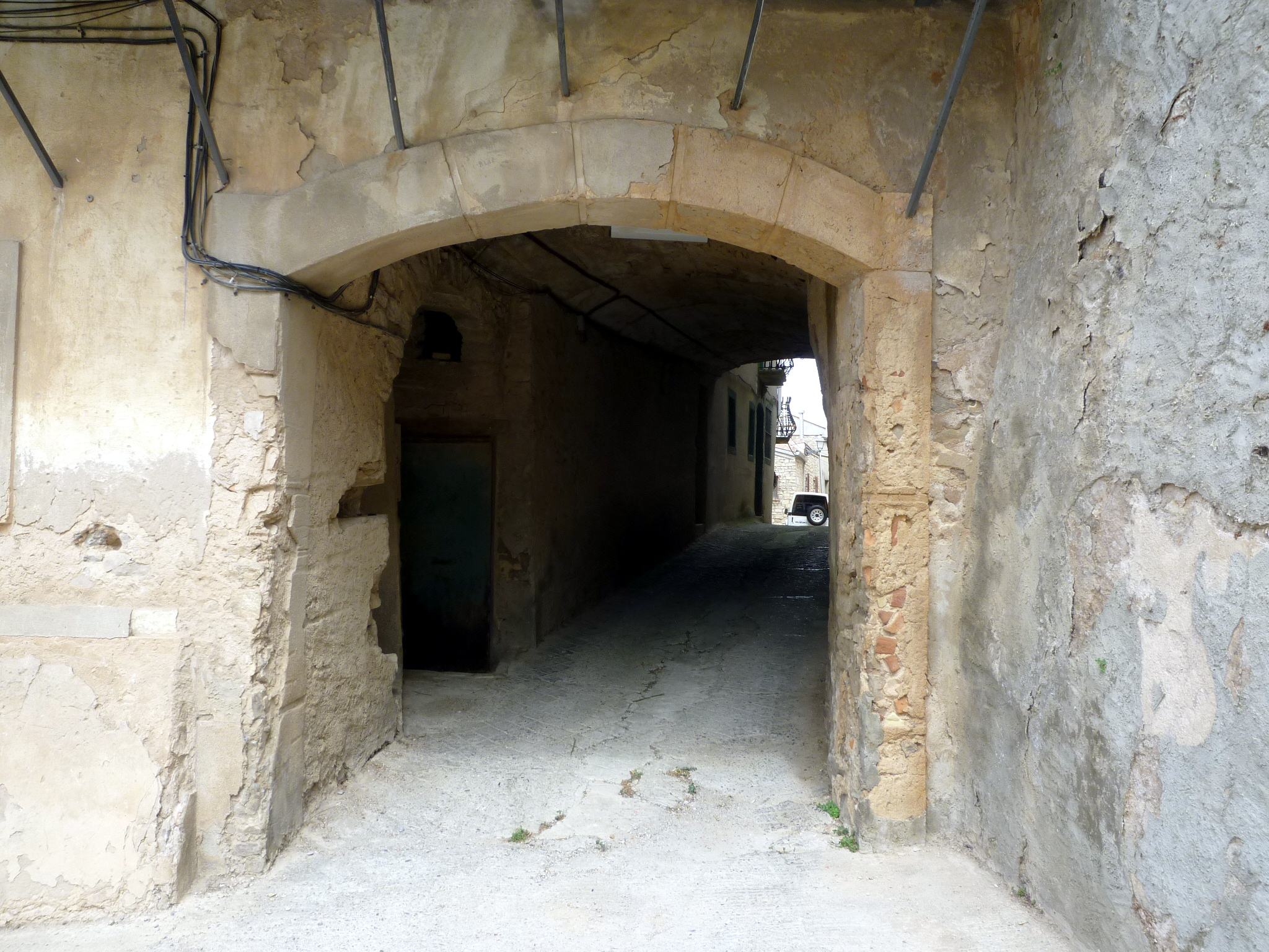 Cal Sarró de Freixenet de Segarra (Sant Guim de Freixenet)